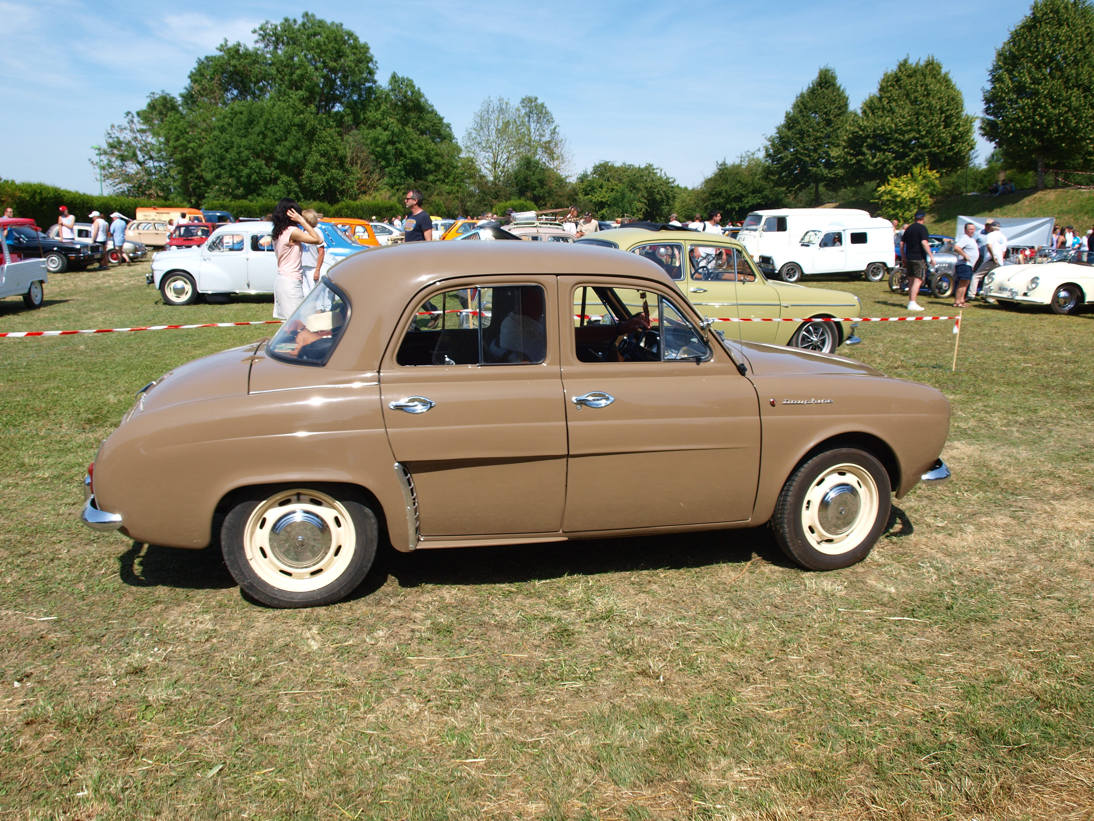 Villemanoche (Yonne, France) ; rassemblement 2014 des véhicules anciens, le 22 juin 2014.